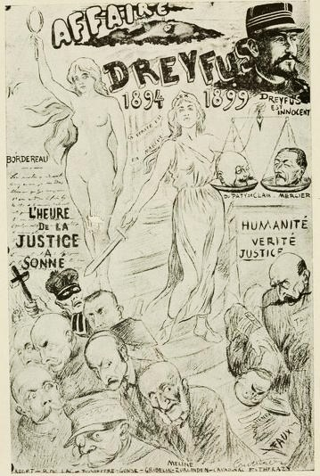 Affaire Dreyfus 1894-1899. L'heure de la vérité a sonné : recto de la carte postale numérotée signée Ed. Couturier imprimée en violet. Au verso : blason de la ville de Rennes.